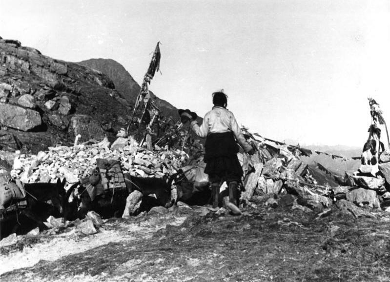 Natula, Passüberschreitung